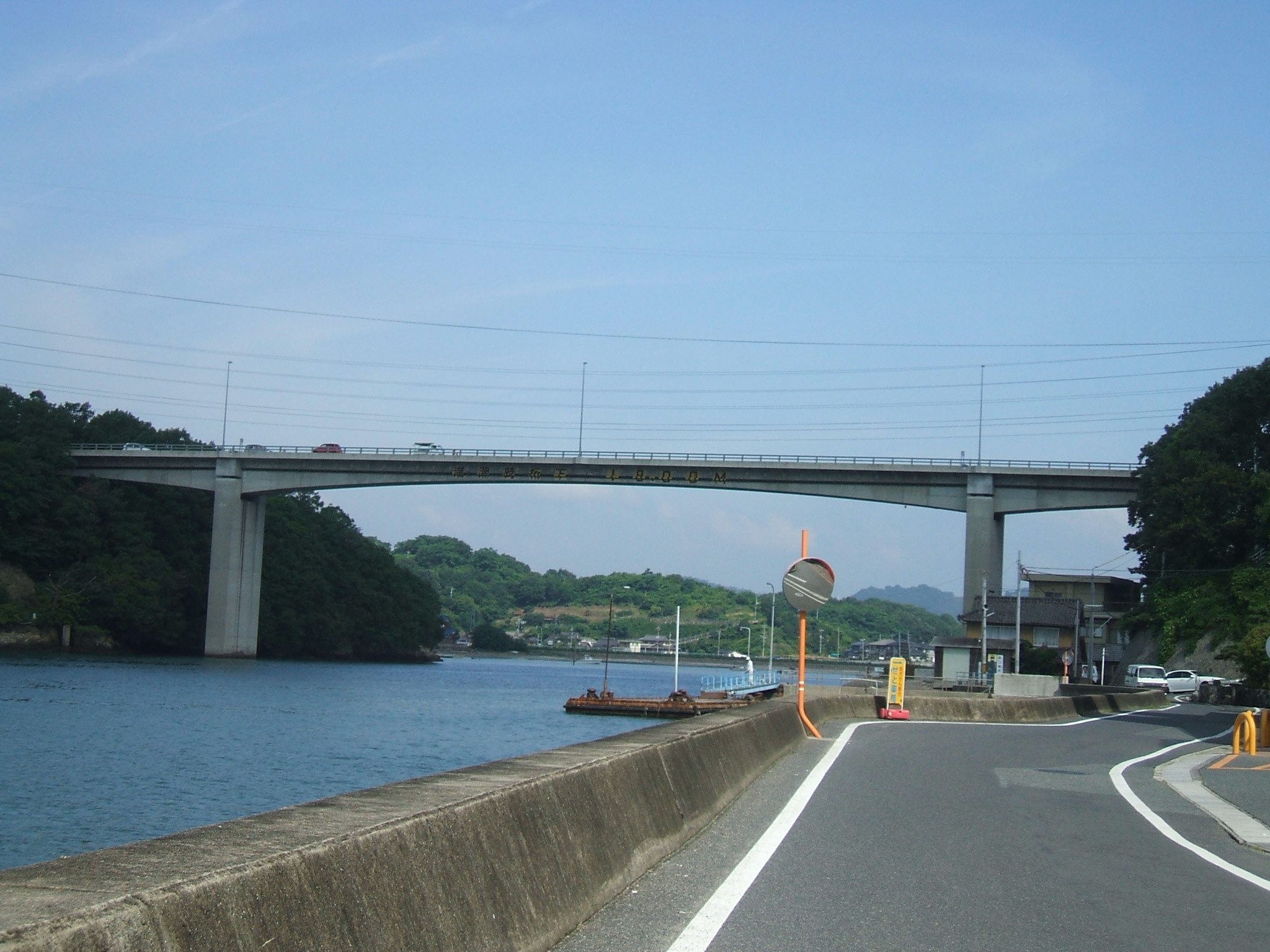 岡山県笠岡市にある神島大橋を南側から撮影。